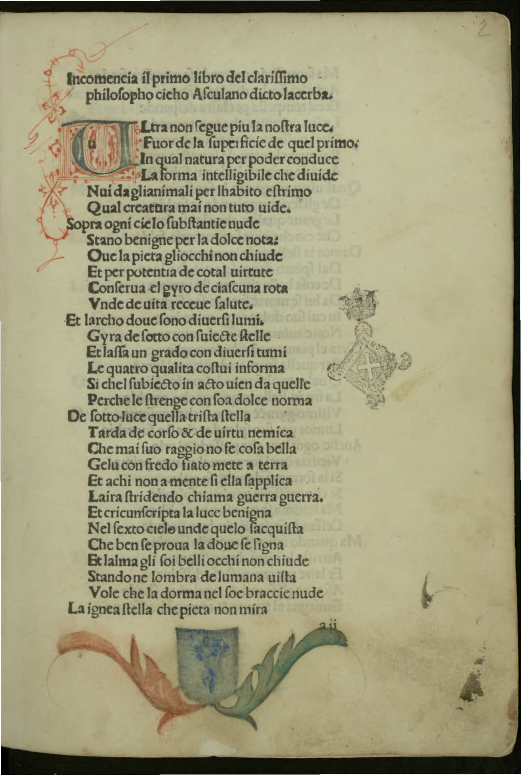 L'Acerba. - Venetiis : per Baptistam de Tortis, Anno MCCCCLXXXIIII die XII febuarii (!). - 96 c. ; a-m⁸ ; 4º. - Manca la c. a1 . Carta a2r (incipit)